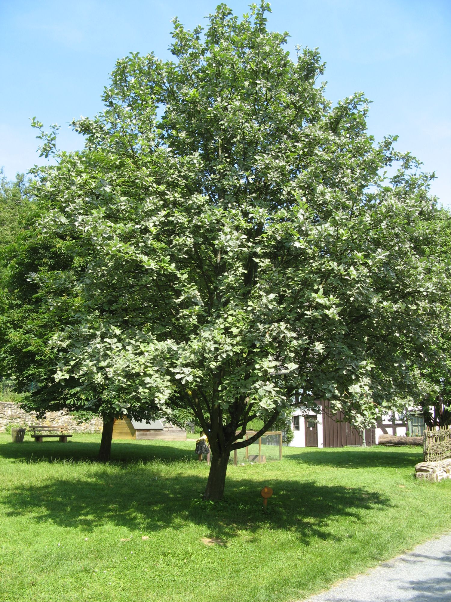 Mehlbeere Baum (Sorbus aria) im Tiergarten Weilburg